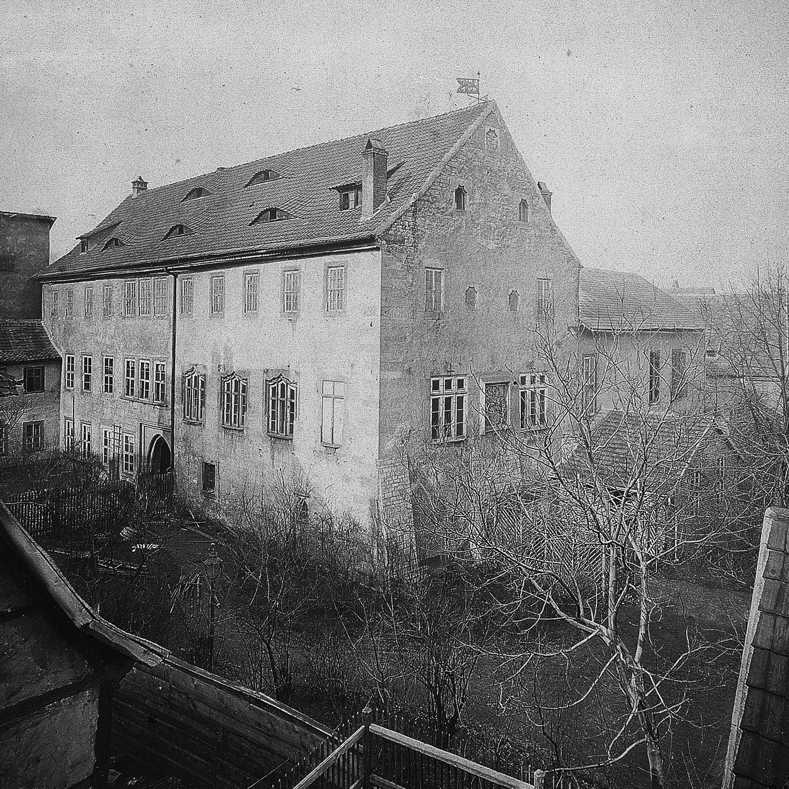 Erfurt Tuniergasse 17, Hauptgebäude 1870